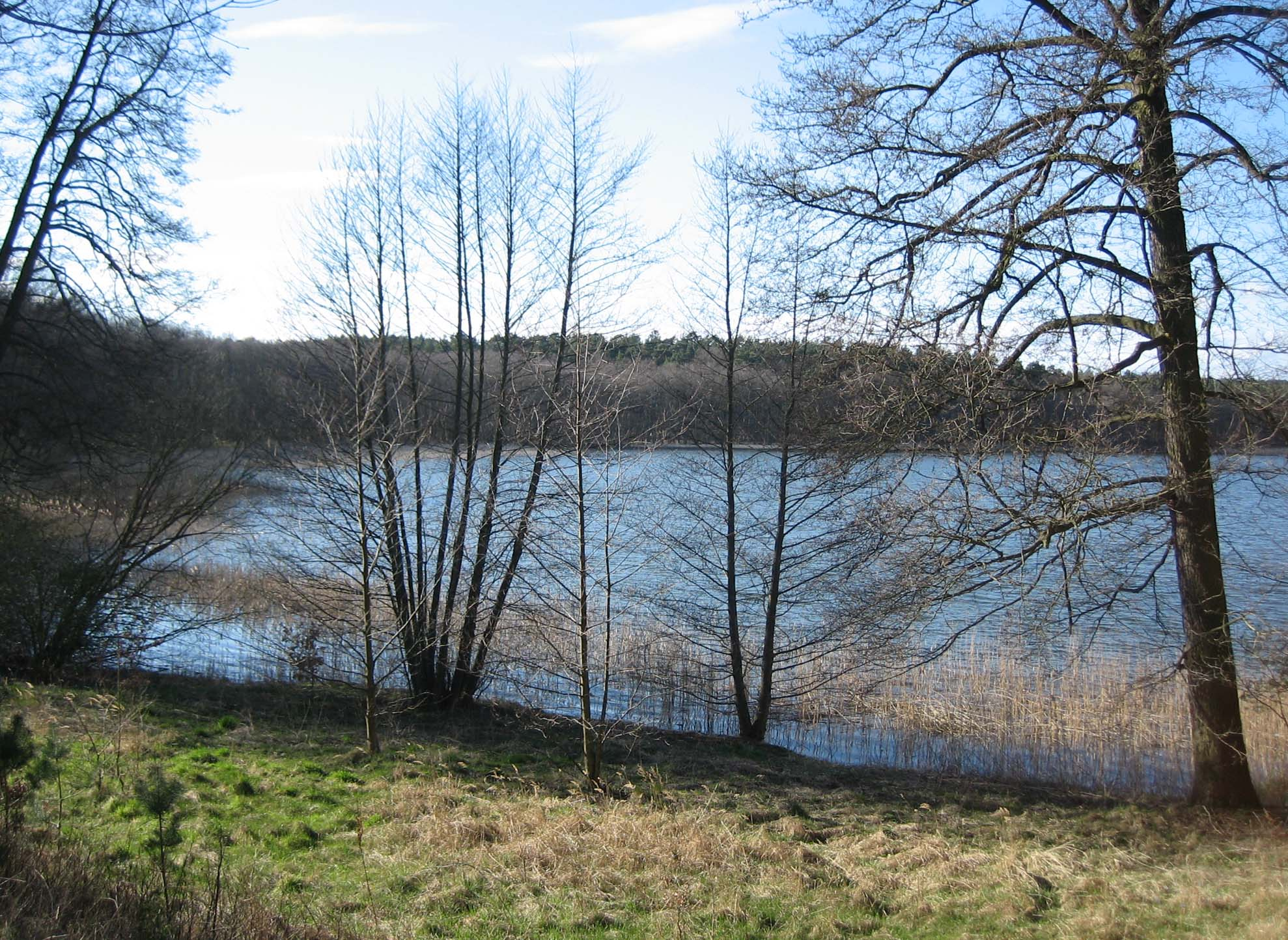 Westufer des Röblinsees.